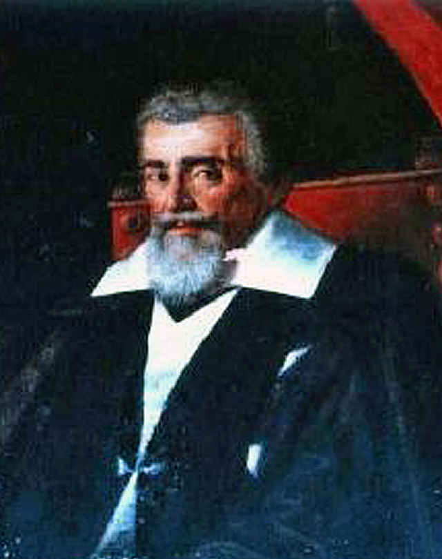 Antoine de Paule, Grand prieur de Saint-Gilles, grand maître de l'Ordre de Saint-Jean-de-Jérusalem